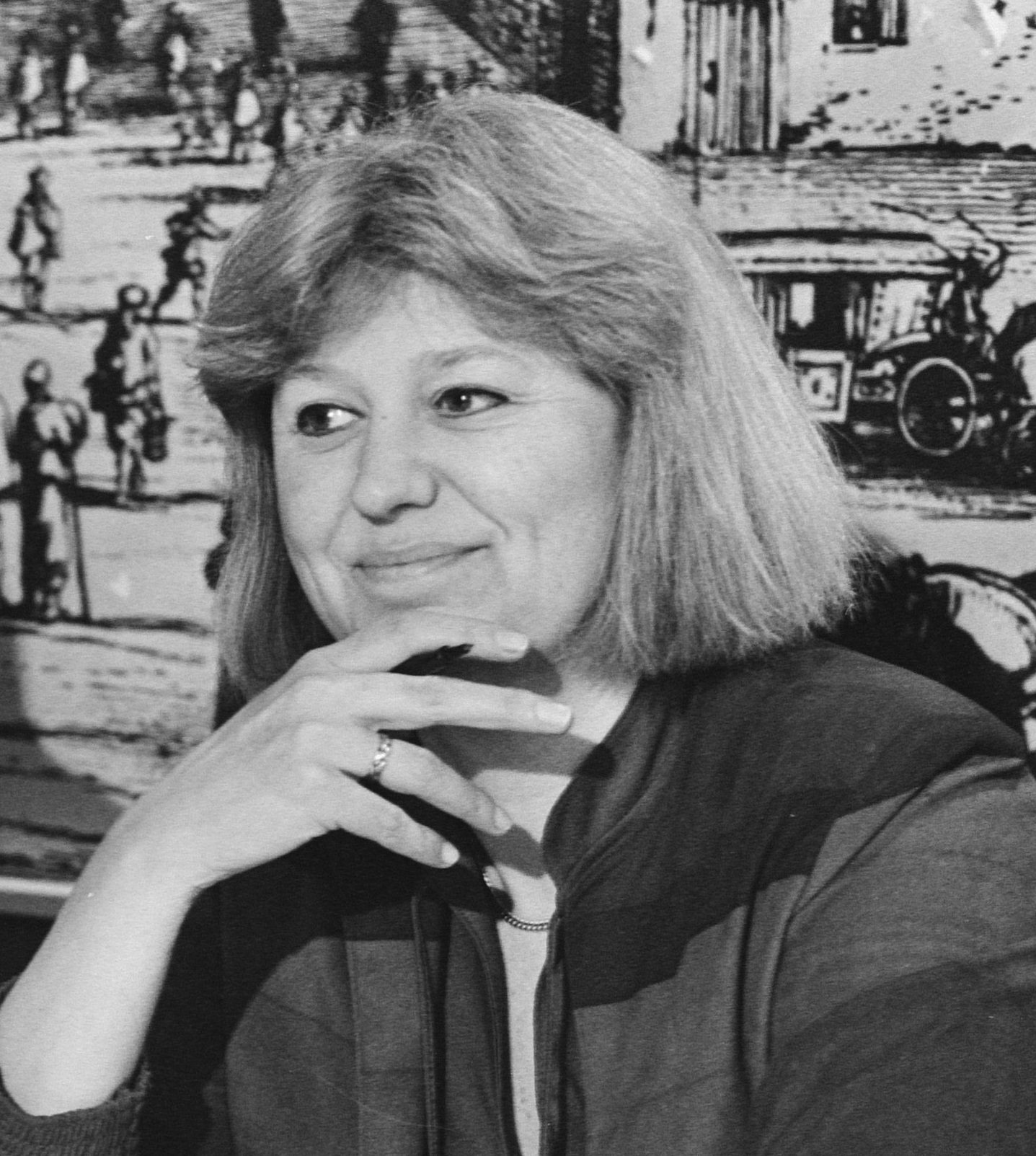 Persconferentie Algemene Rekenkamer over jaarverslag; lid Saskia Stuiveling.